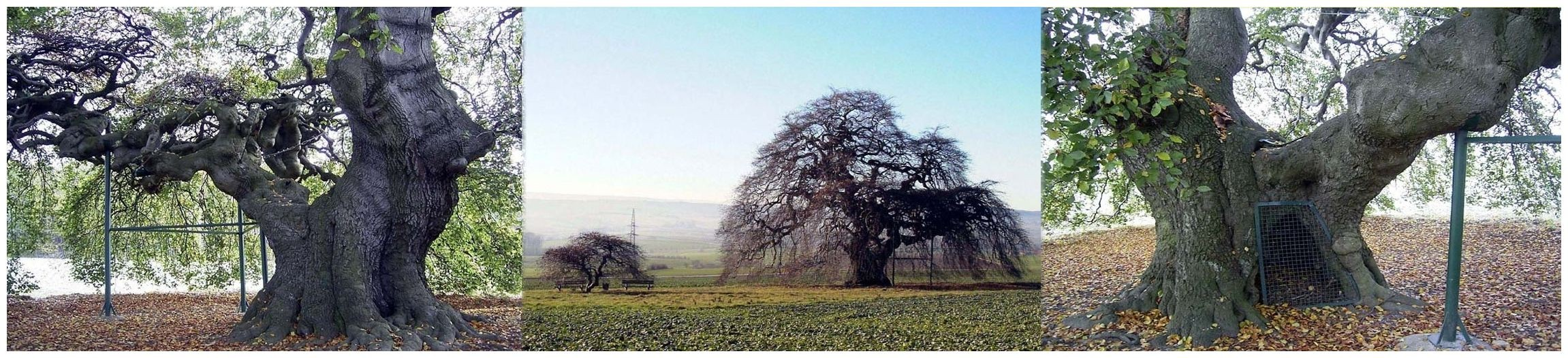 Der gewaltige Stamm der Gremsheimer Süntelbuche (Fagus sylvatica 'Tortuosa').